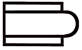 Schema einer merowingischen Basilika ohne Querhaus